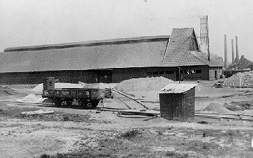 Opslagloods van mineralen van de "Maastrichtsche Zinkwit Maatschappij" aan de Franciscus Romanusweg in Maastricht. Fotocollectie RHCL Maastricht, GAM 150.